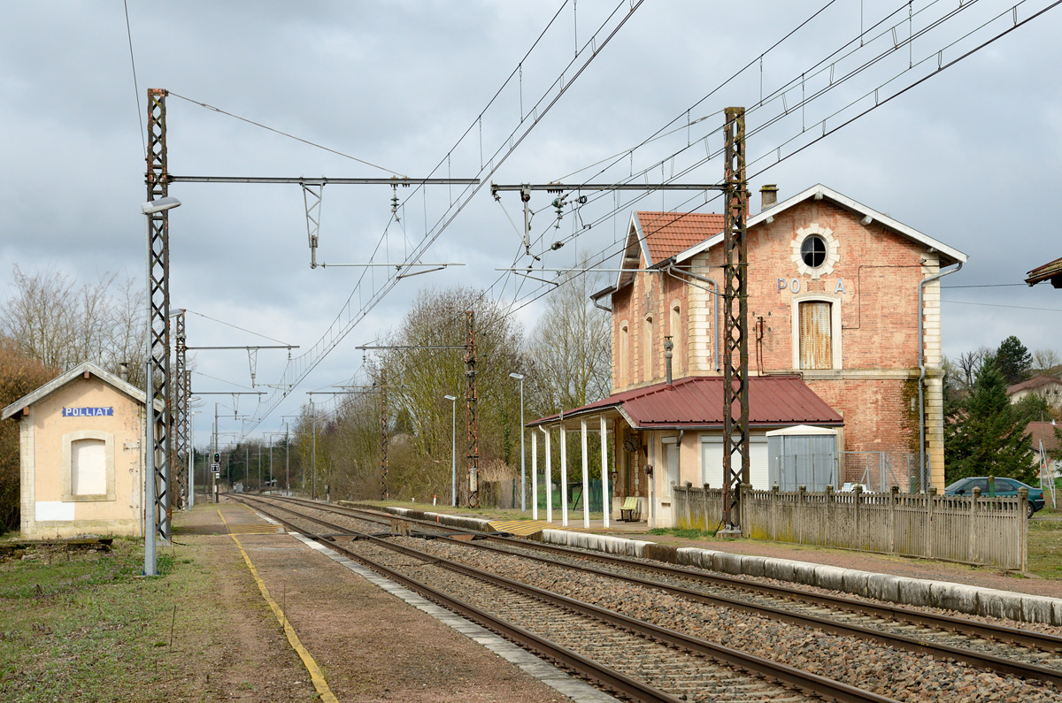 Gare SNCF de Polliat, Ain, en Mars 2011.